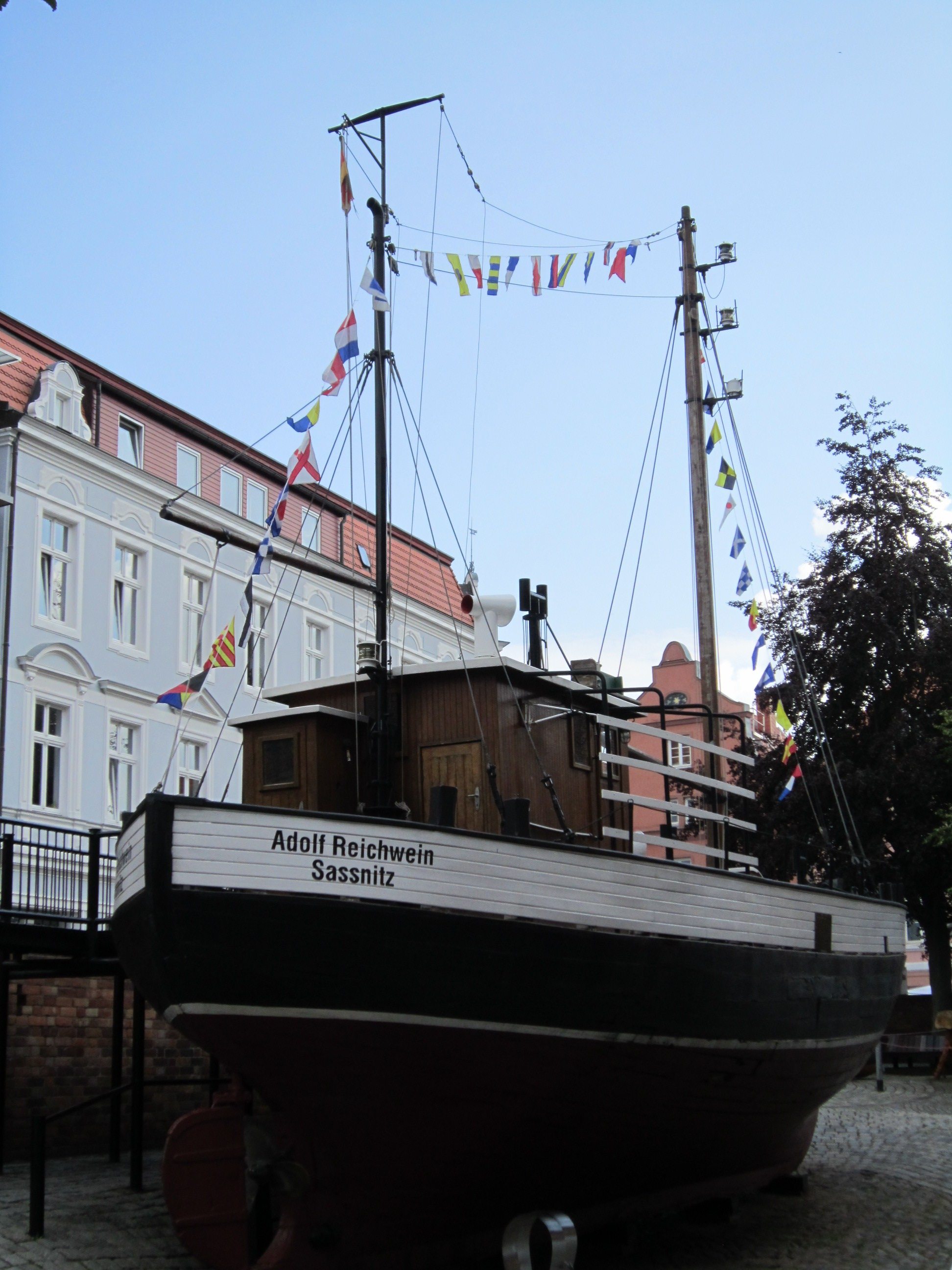 Schiff "Adolf Reichwein" vor dem Deutschen Meeresmuseum Stralsund